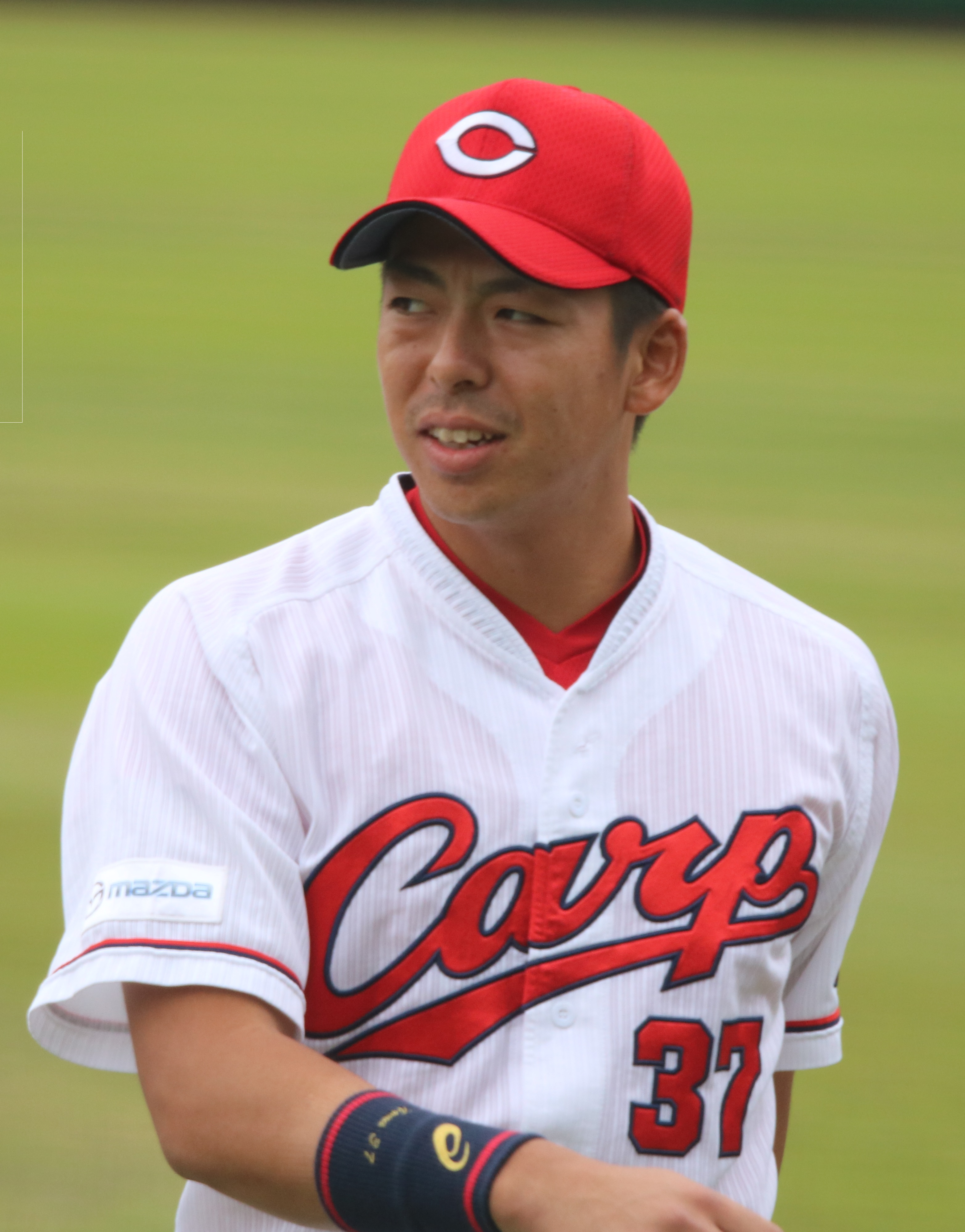 2017年11月14日 日南市天福球場にて